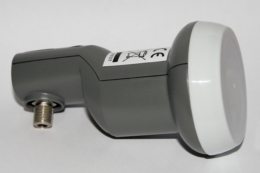 LNB